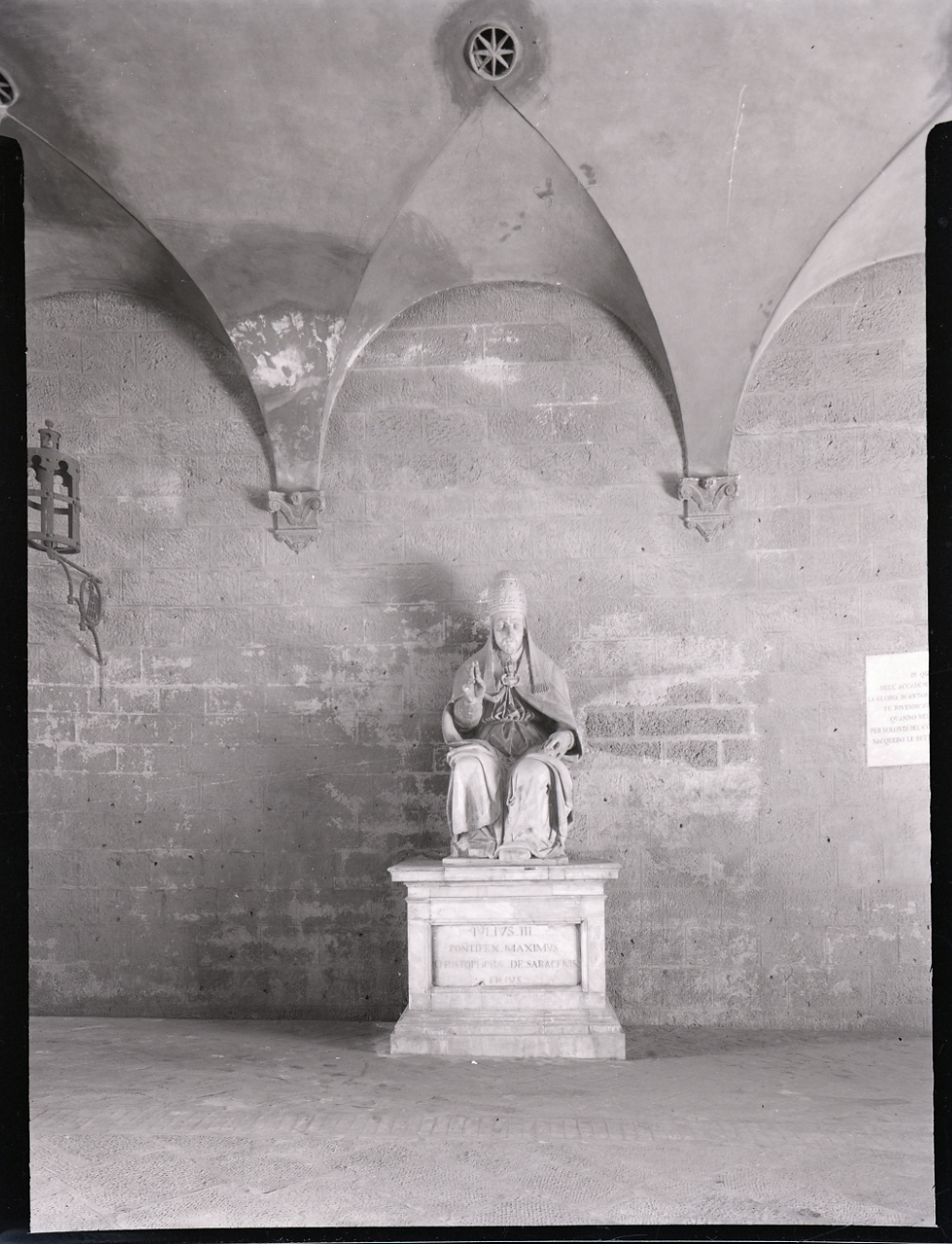 Servizio fotografico : Siena, 1965 / Paolo Monti. - Buste: 24, Fototipi: 25 : Negativo b/n, gelatina bromuro d'argento/ pellicola ; 10x12. - ((Serie costituita da 24 buste di negativi identificati con i nn.: 1632, 1633, 1634, 1635, 1636, 1637, 1638, 1639, 1640, 1641, 1642, 1643, 1644, 1645, 1646, 1647, 1648, 1649, 1650, 1651, 1652, 1653, 1654, 1655, 1656, e tenute insieme da una graffetta. . - Sulla busta identificata con la numerazione 1632/33 iscrizione didascalica manoscritta a matita: "Garzanti( (vasi) Fiori". - Sul coperchio della scatola iscrizione didascalica manoscritta a pennarello nero: "Garzanti". - I negativi presentano leggeri segni di degrado (gelatina raggrinzita). - Occasione: Documentazione per la pubblicazione: Cecchi Emilio, Sapegno Natalino (a cura di), "Storia della Letteratura Italiana", 9 voll., Milano, Garzanti, 1966 e segg. - Fonte: Monografia di Cecchi Emilio, Sapegno Natalino (a cura di): Storia della Letteratura Italiana, 9 voll., Milano, Garzanti (1966 e segg.). - Fonte: Rubrica di Paolo Monti: Archivio 10x12 (ultimi numerati) - dal G1 al (s.d.), presso Archivio Paolo Monti